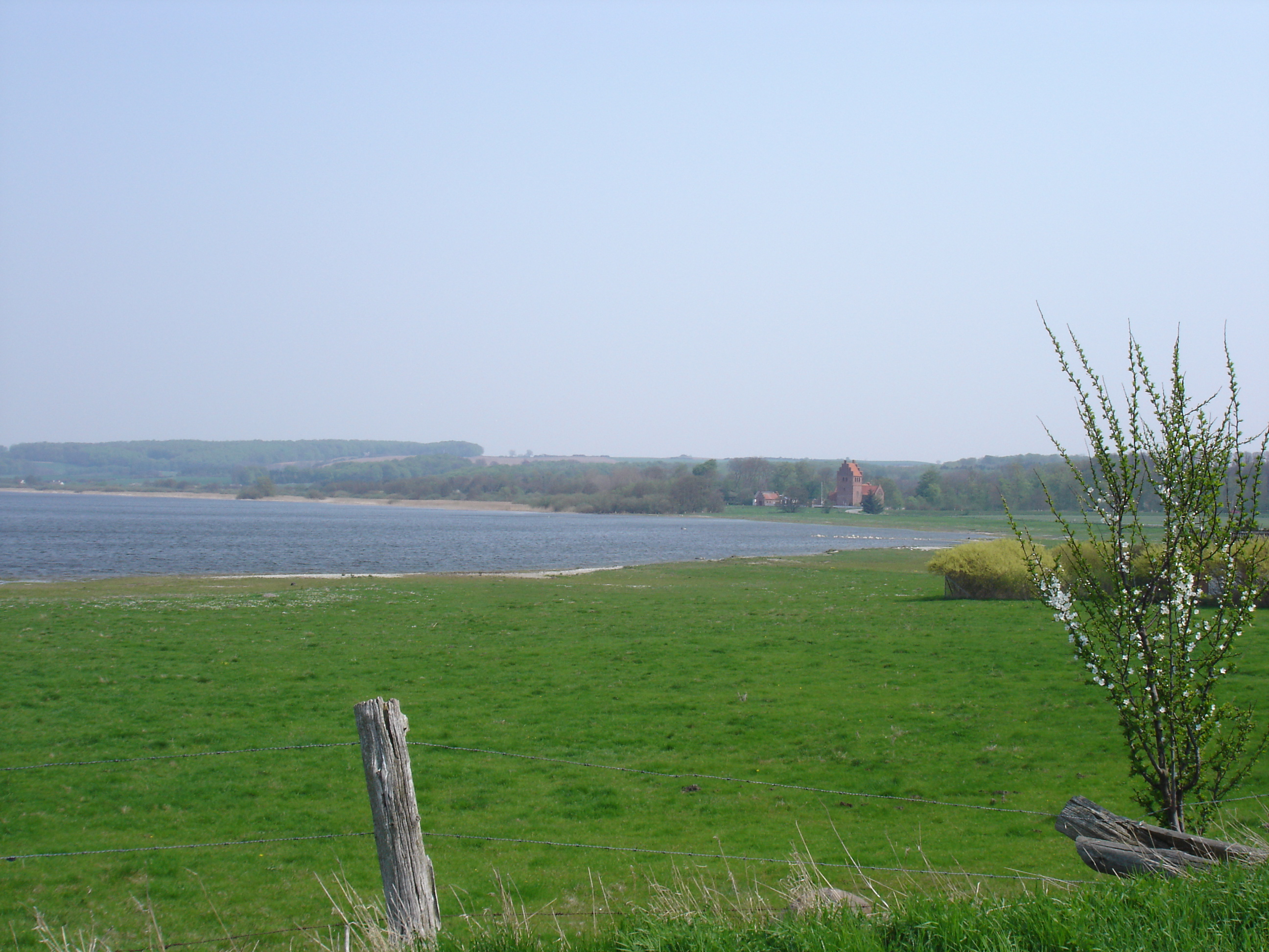 Tissø ved Sæby Kirke